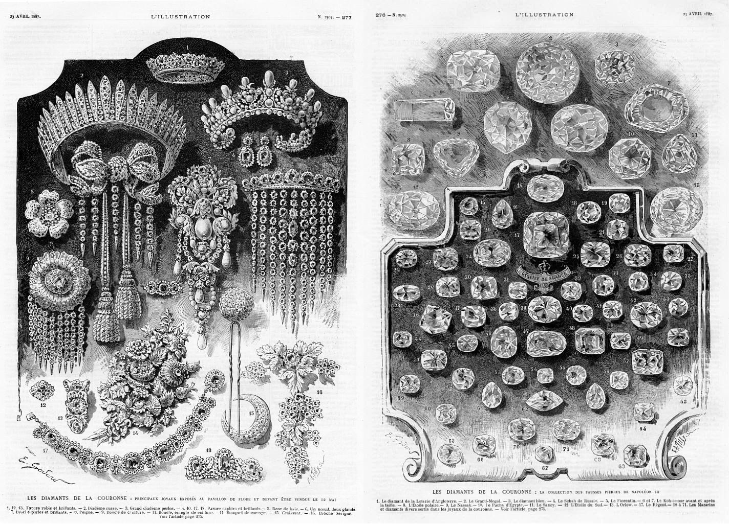 Pages du catalogue de la Ventes des Joyaux de la Couronne de 1887. Certains des joyaux représentés dans la deuxième page n'existaient déjà plus en 1887.